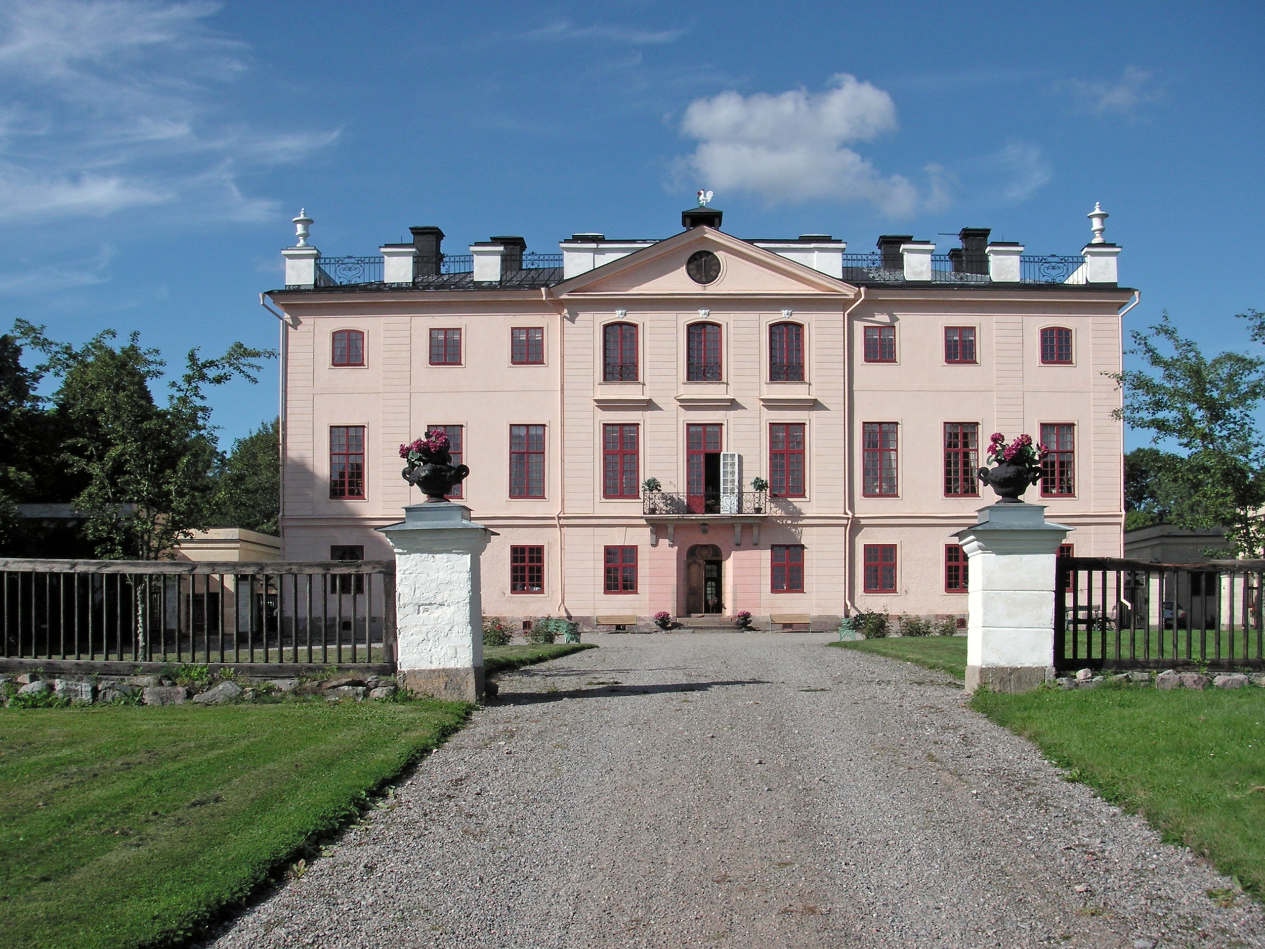 castle picture